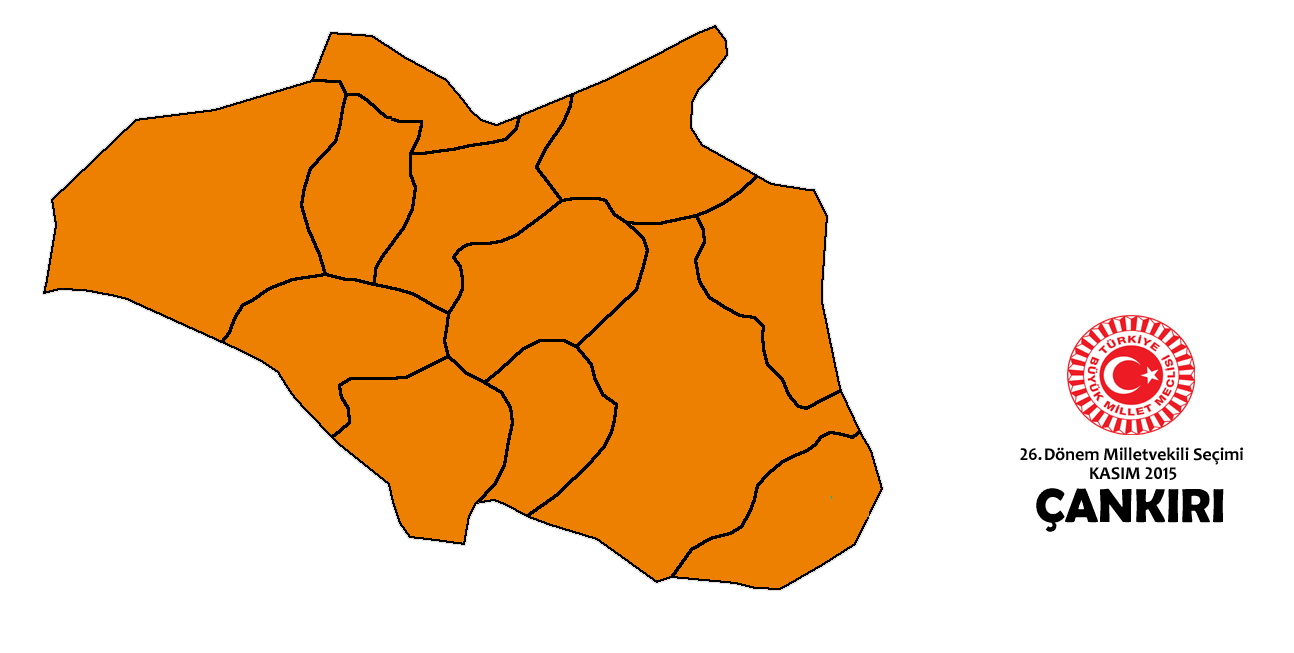 Kasım 2015 seçimleri